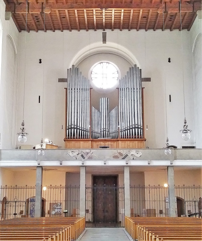 Interior of Maria Königin des Friedens (Munich)